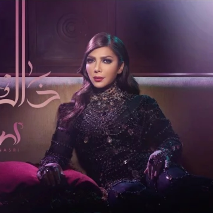 أصالة نصري - ذاك الغبي